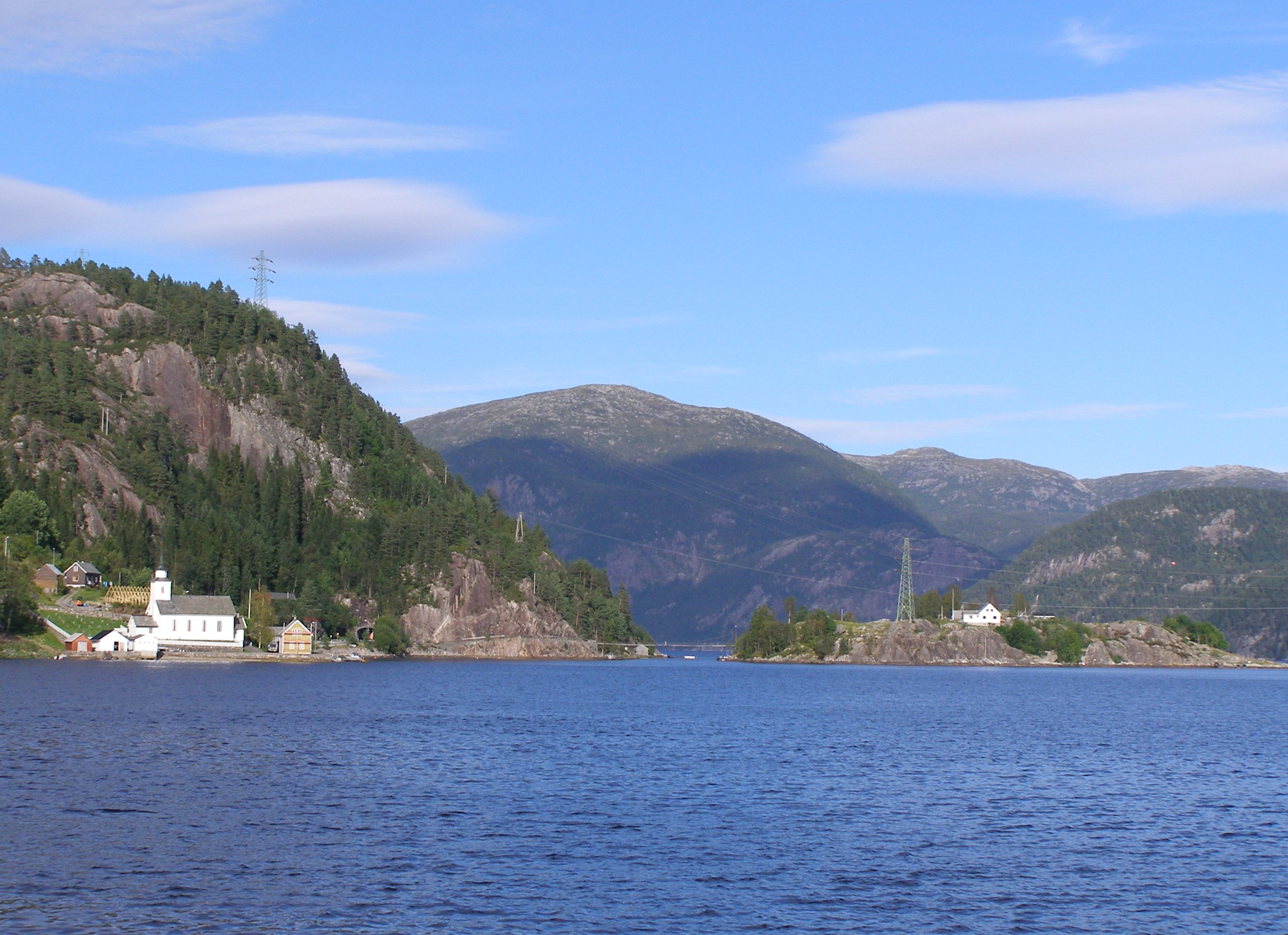 Geminde Vikaneset im Norden von Osterfjorden, rechts die kleine Insel Vikaholmen Vikaneset on the north end of the Osterfjorden, the islet Vikaholmen on the right